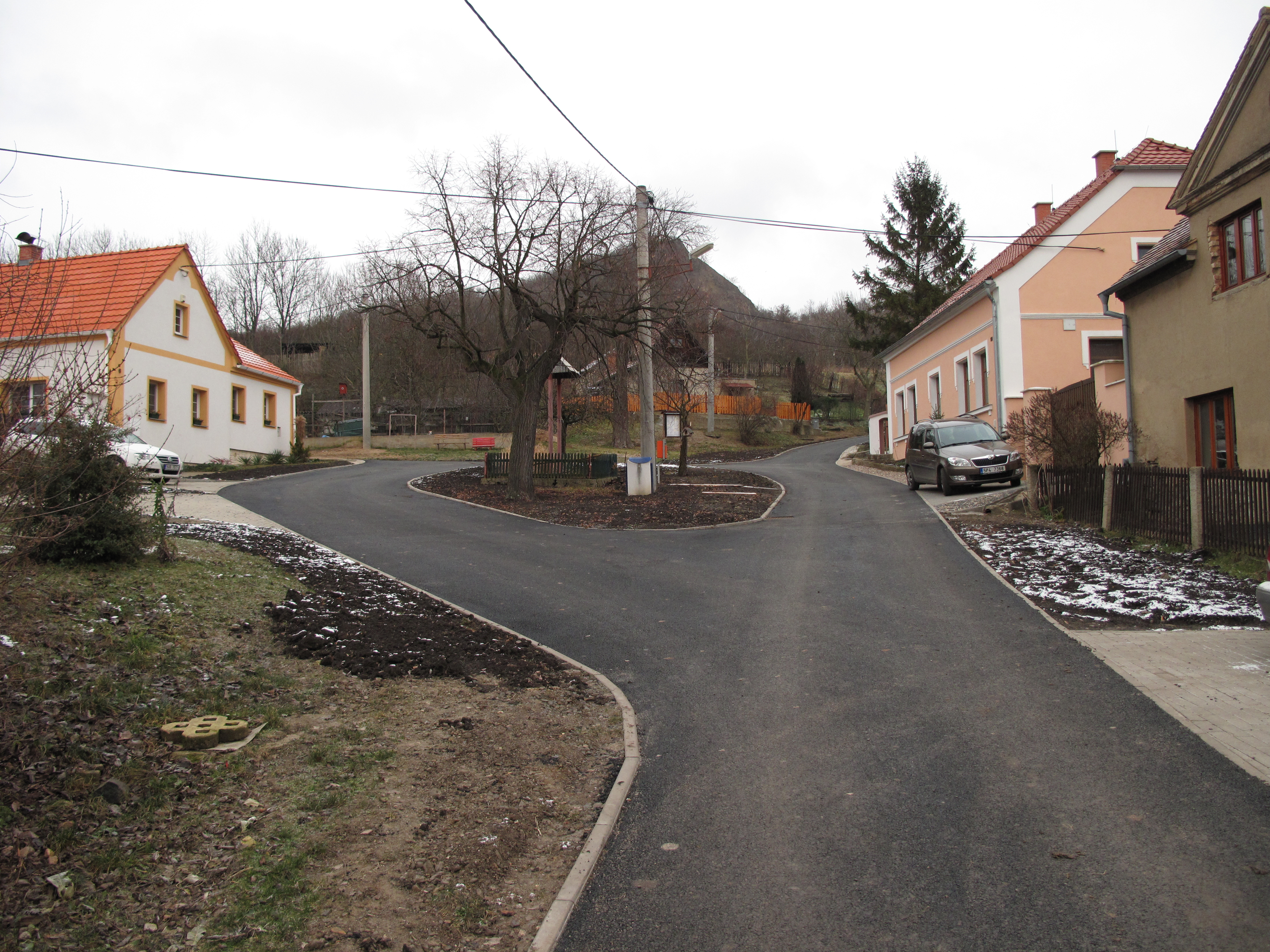 Náves v Obřicích. Okres Litoměřice, Česká republika.